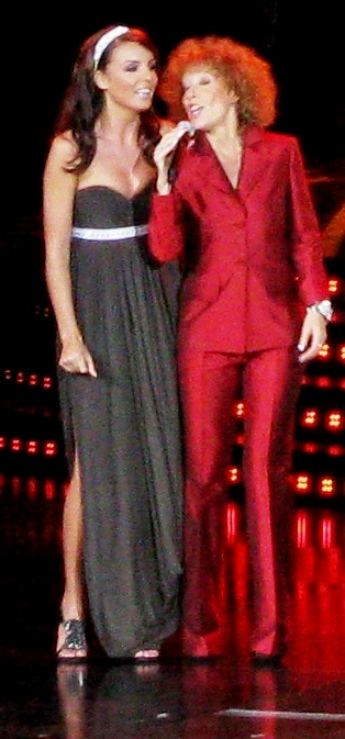 Agnieszka Włodarczyk i Alicja Majewska podczas koncertu jubileuszowego 100–lecia Opery Leśnej na festiwalu TOPtrendy 2009 w Sopocie, 27 czerwca 2009